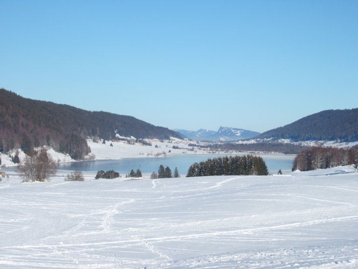 Le lac des Rousses